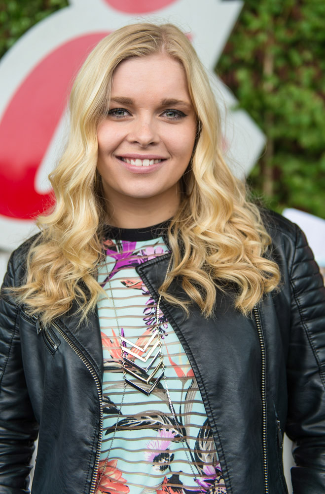 Ida LaFontaine var en av artisterna inför Allsång på Skansen som presenteras den 10 juni 2015 på Skansen i Stockholm.